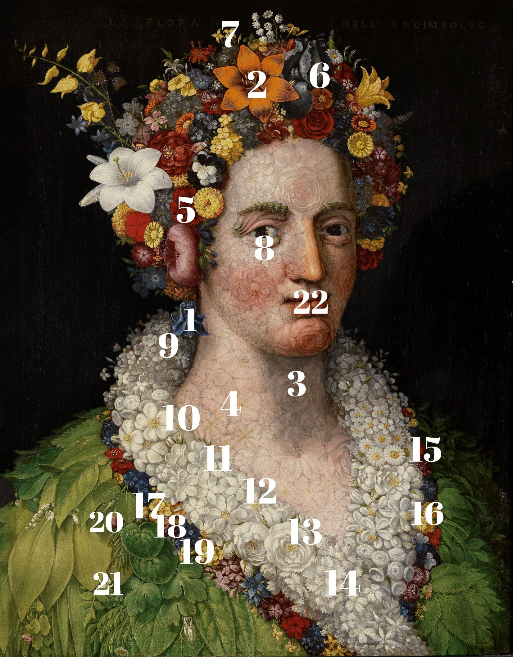 Flora con numeros para poder identificar las flores